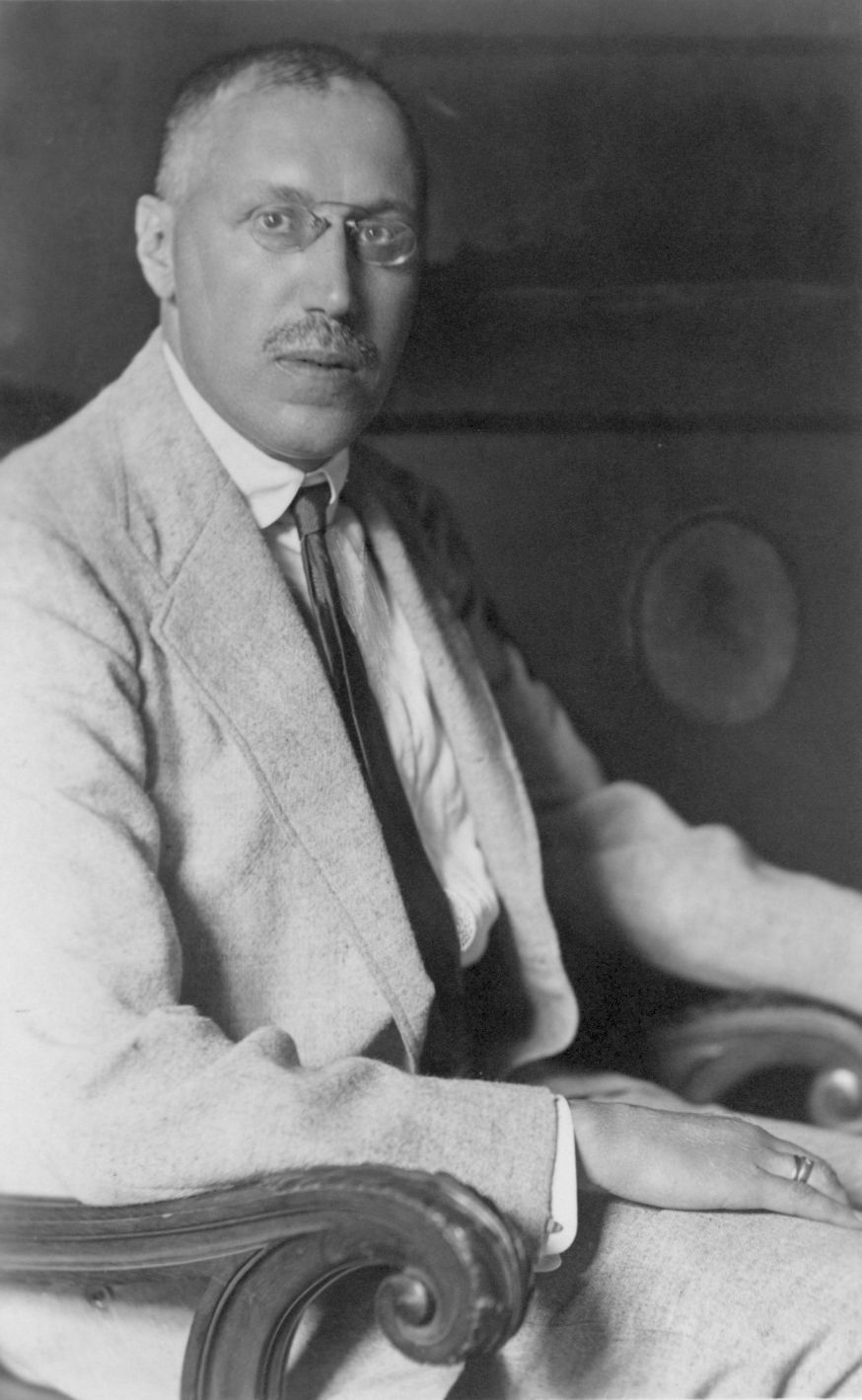 Hans Hahn (1879-1934), matemàtic vienès